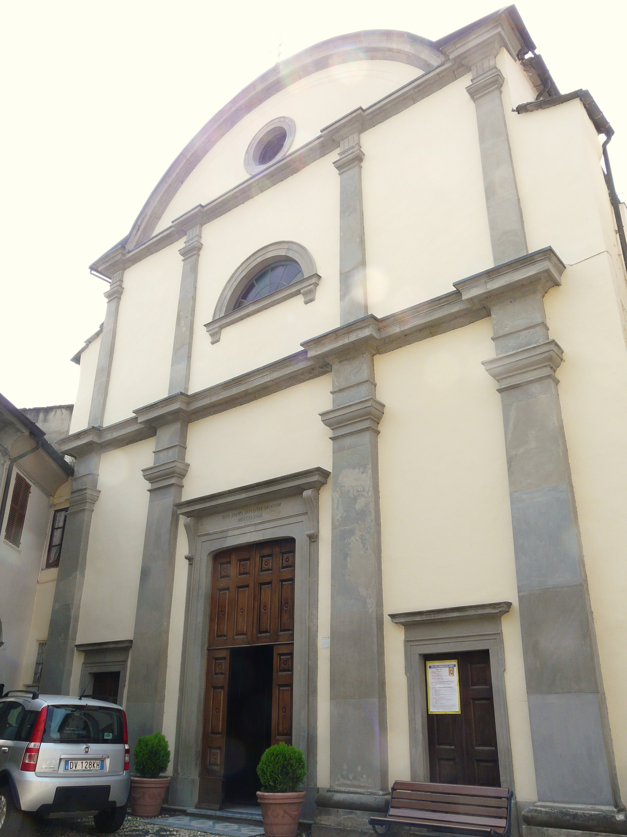 Chiesa di San Giovanni Battista, Compiano, Emilia Romagna, Italia